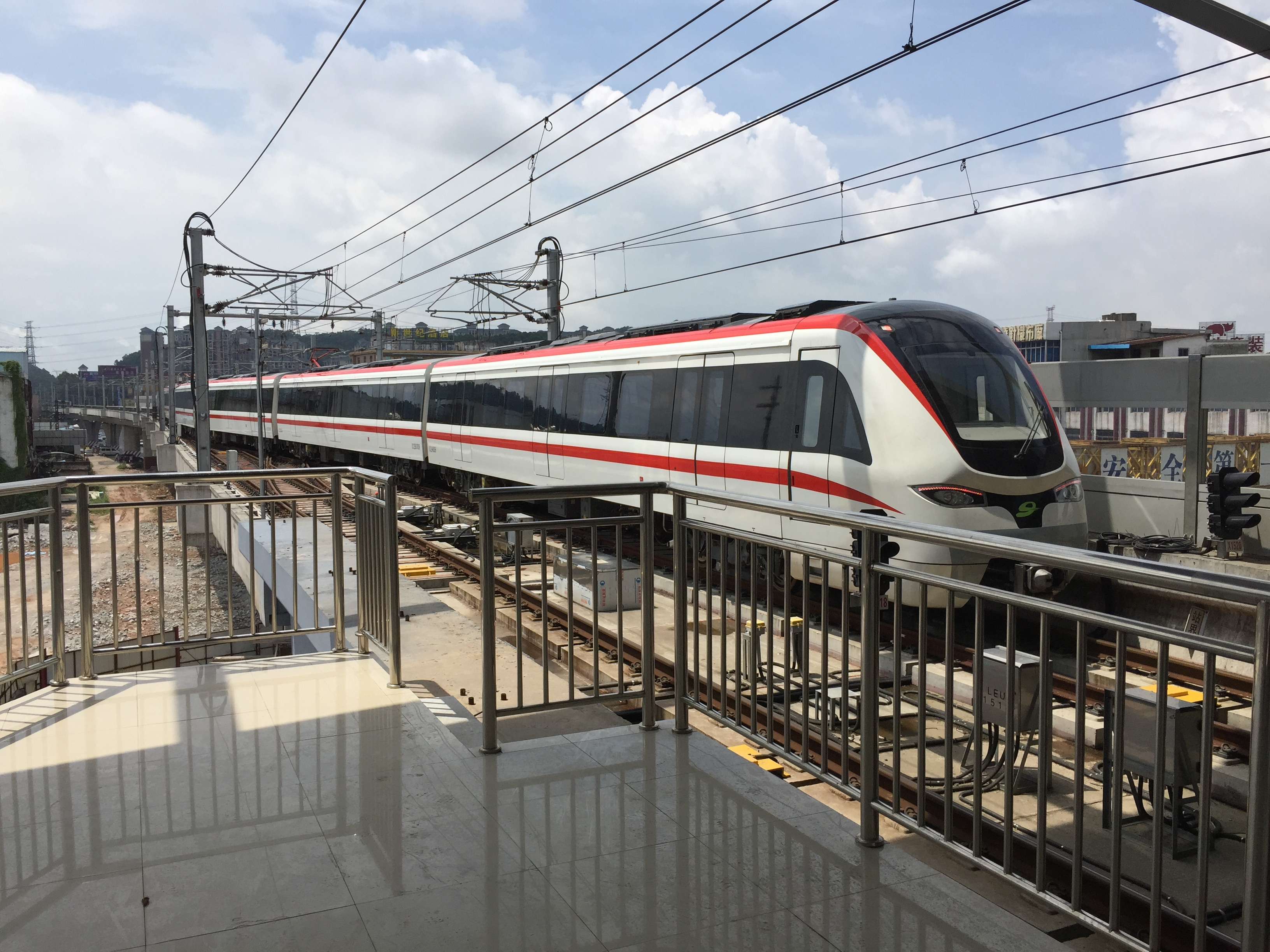 Dongguan Rail Transit Line 2